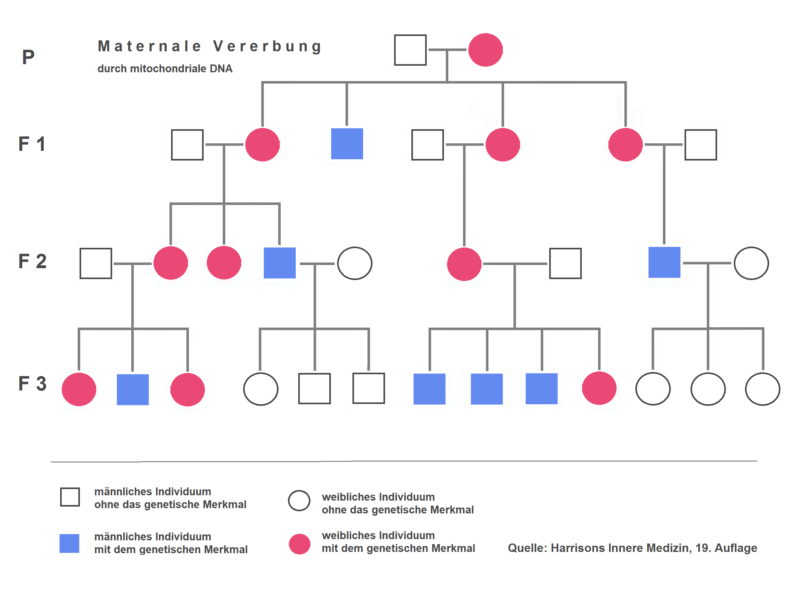 Maternale Vererbung eines auf der mitochondrialen DNA coderten Merkmals